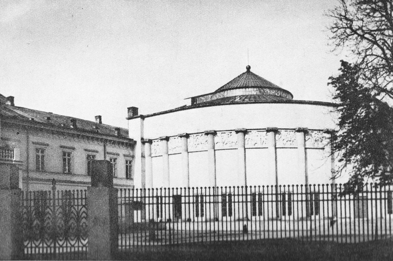 Gmach Sejmu od strony ul. Wiejskiej